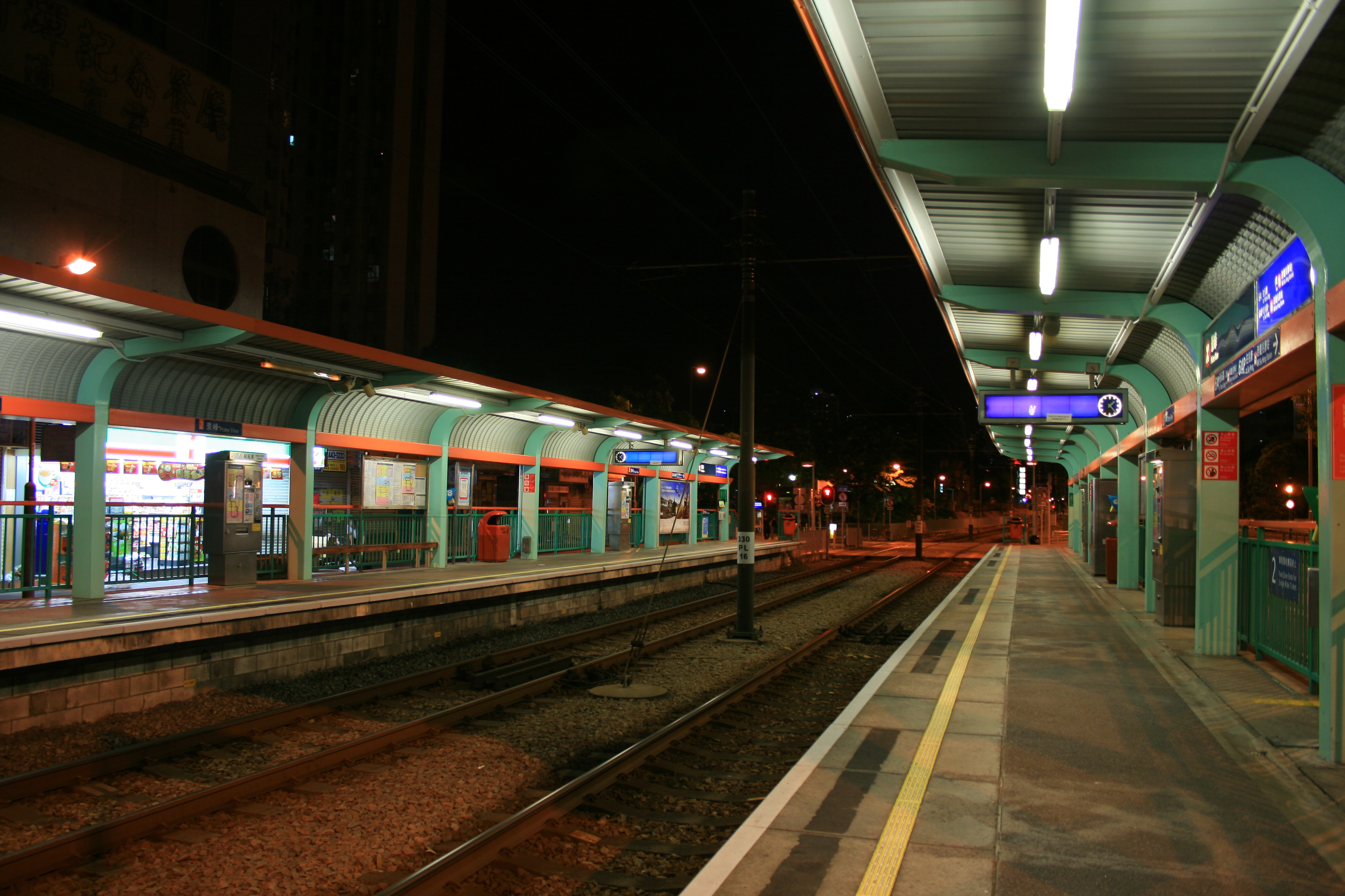 中文（香港）: 輕鐵景峰站。